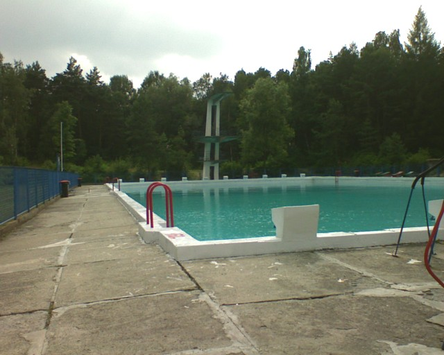 Pływania w Wolbromiu